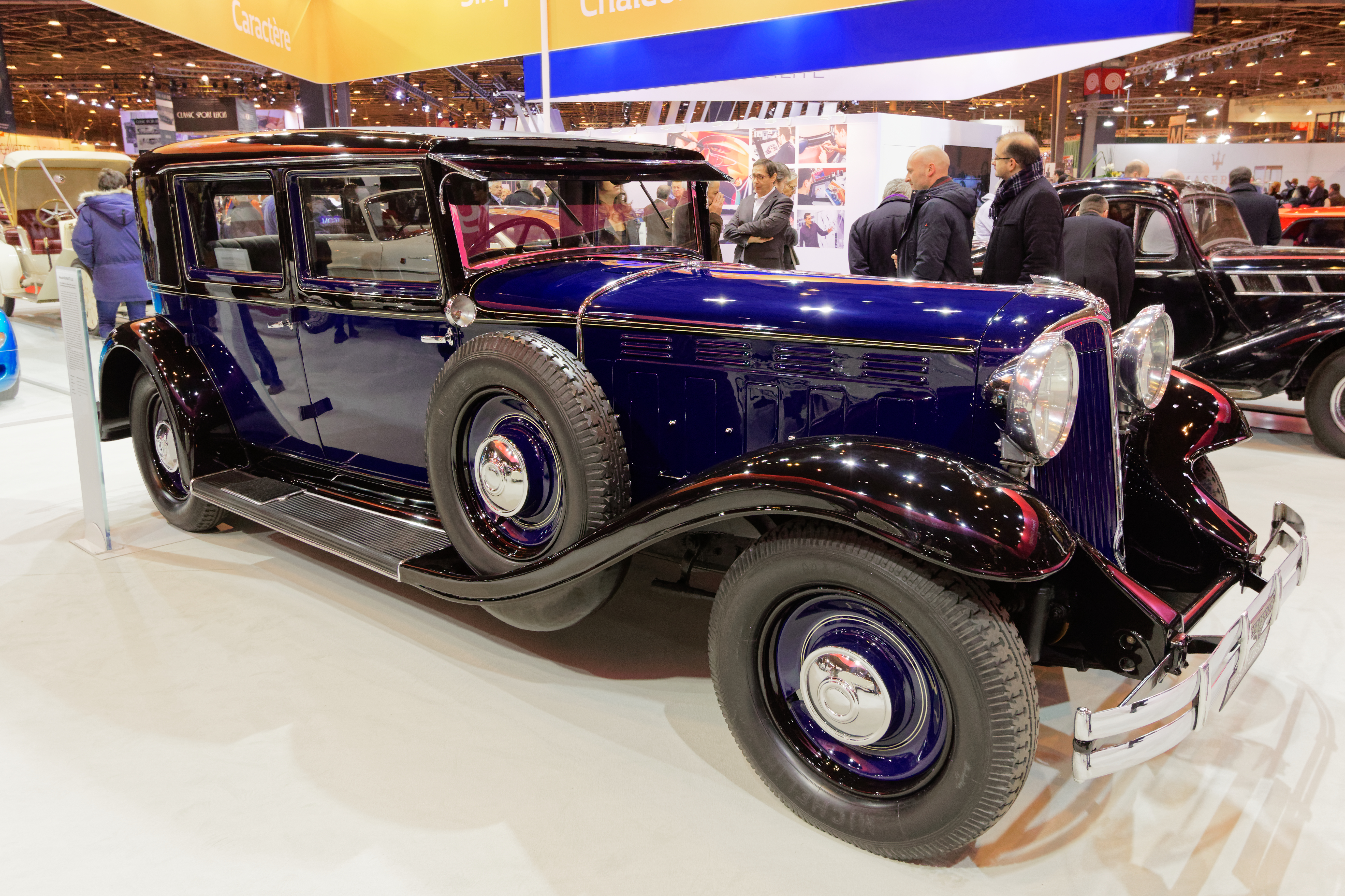 Une Renault Reinastella Type RM 2 de 1932 exposé lors du salon Rétromobile 2017.